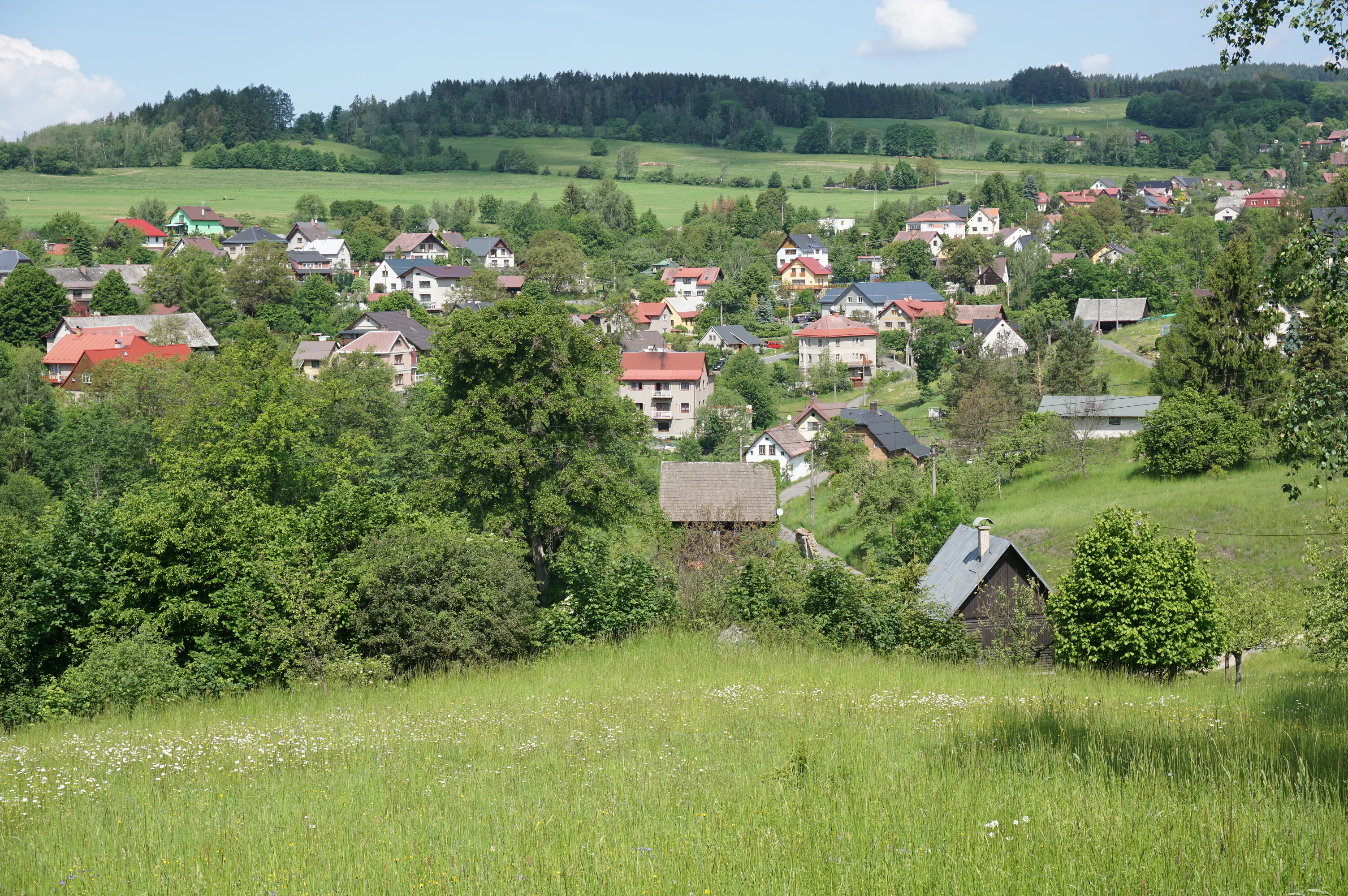 Huntířov (u Železného Brodu) - celkový pohled od jihovýchodu, z cesty do Bzí